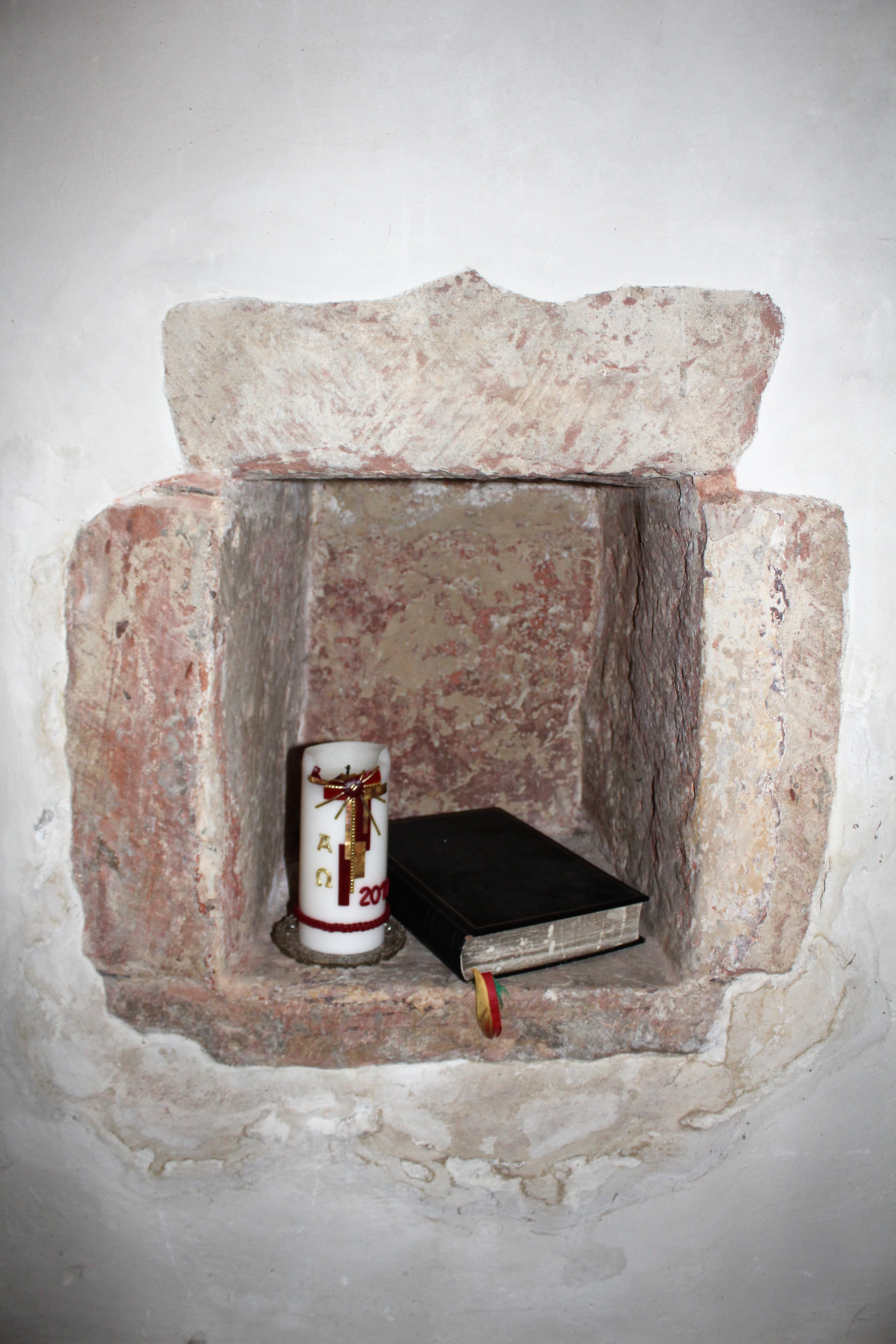 Evangelische Kirche Leidenhofen, Gemeinde Ebsdorfergrund, Landkreis Marburg-Biedenkopf, Hessen, Deutschland